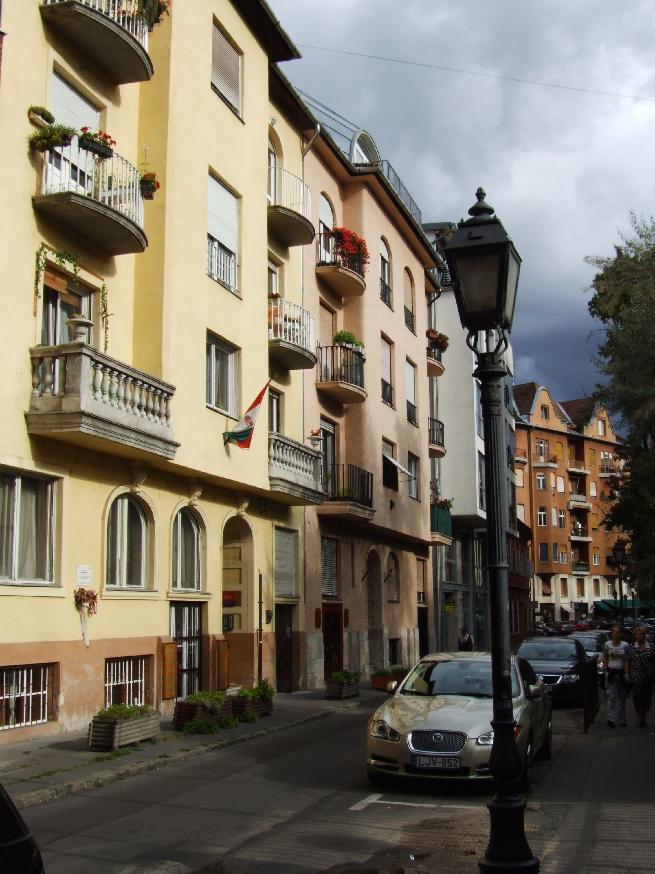 Cseh Tamás lakóháza (Budapest, I. kerület, Iskola utca